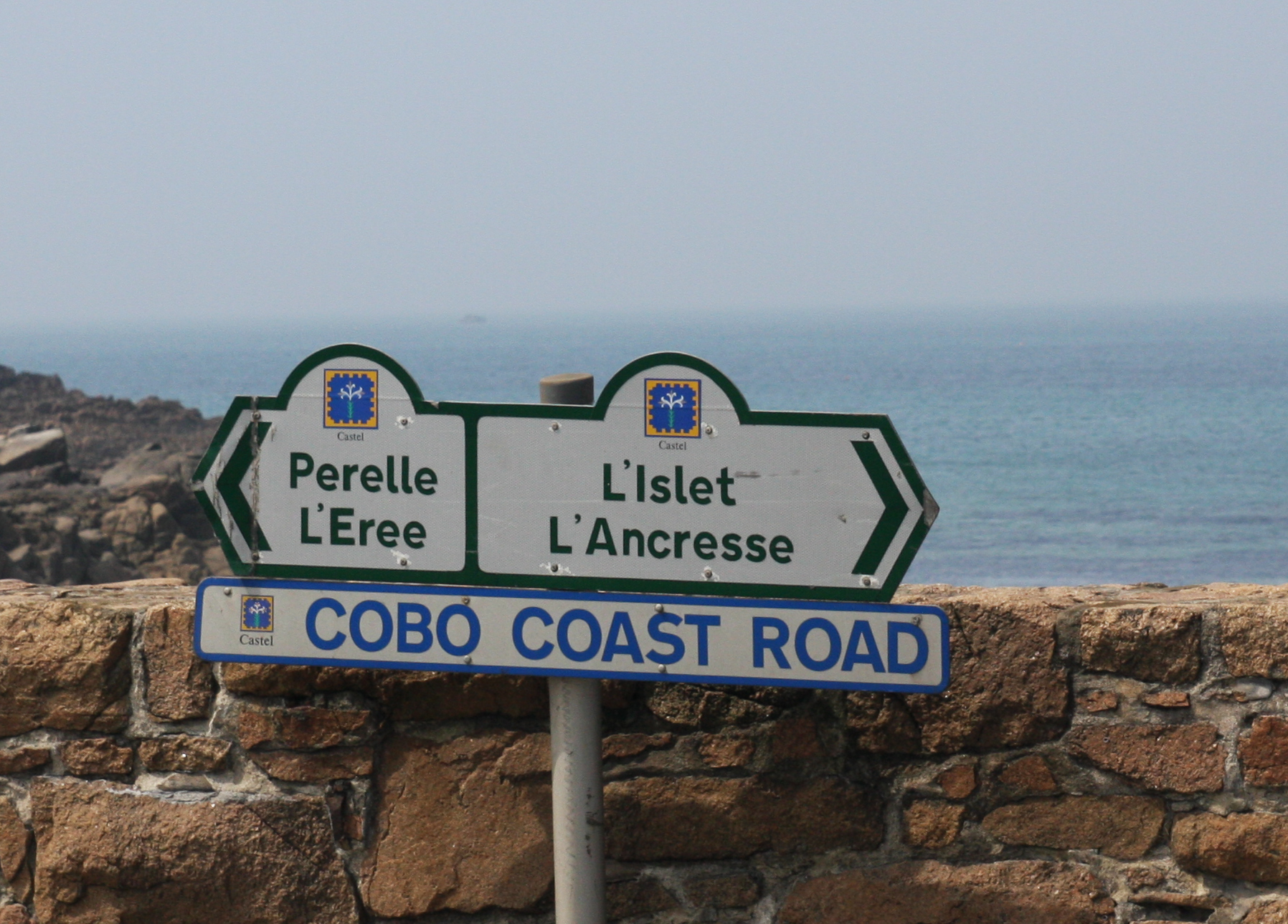 Cobo coast road, Castel, Guernsey